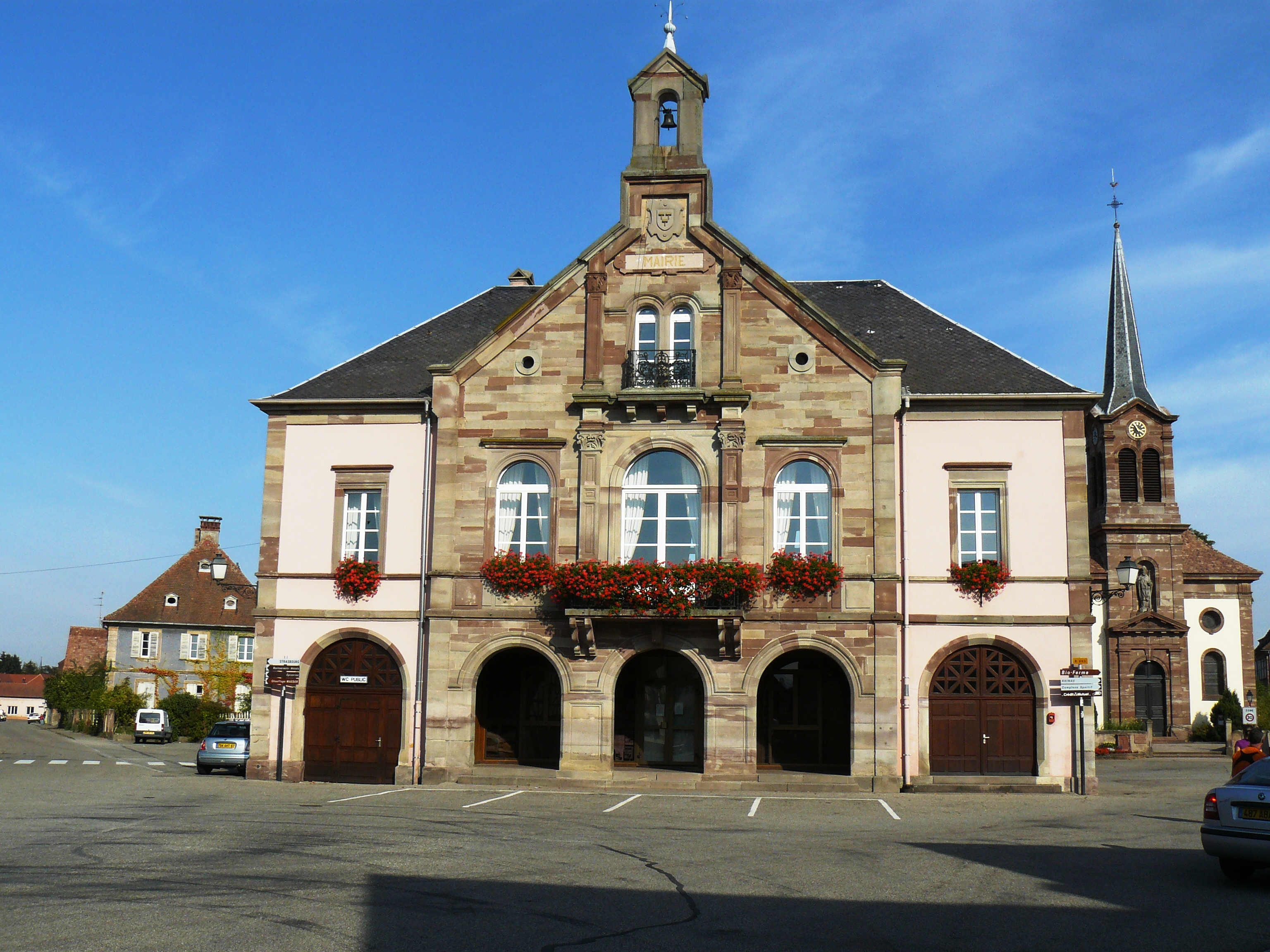 Mairie de Kogenheim